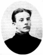 Léon Trulin (Ath, 1897 - Lille, 1915) est un jeune patriote fusillé par les autorités militaire allemandes pour espionnage pendant la Première Guerre mondiale.